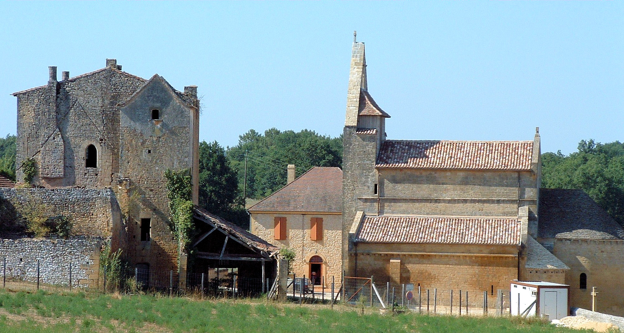 Sainte-Croix (Dordogne) - Eglise Sainte-Croix et maison du Prieur